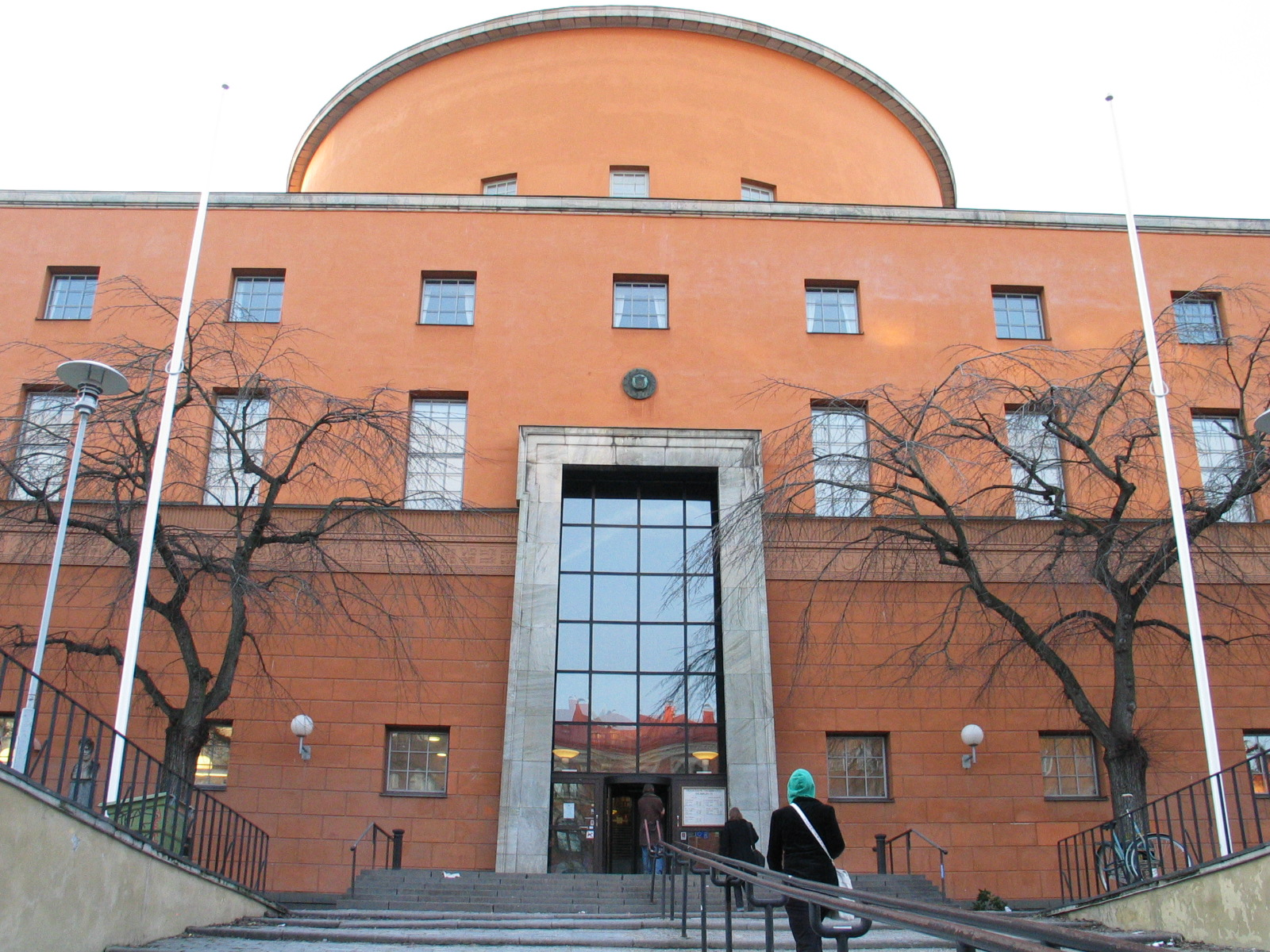 Stockholms stadsbiblioteks entré mot Sveavägen